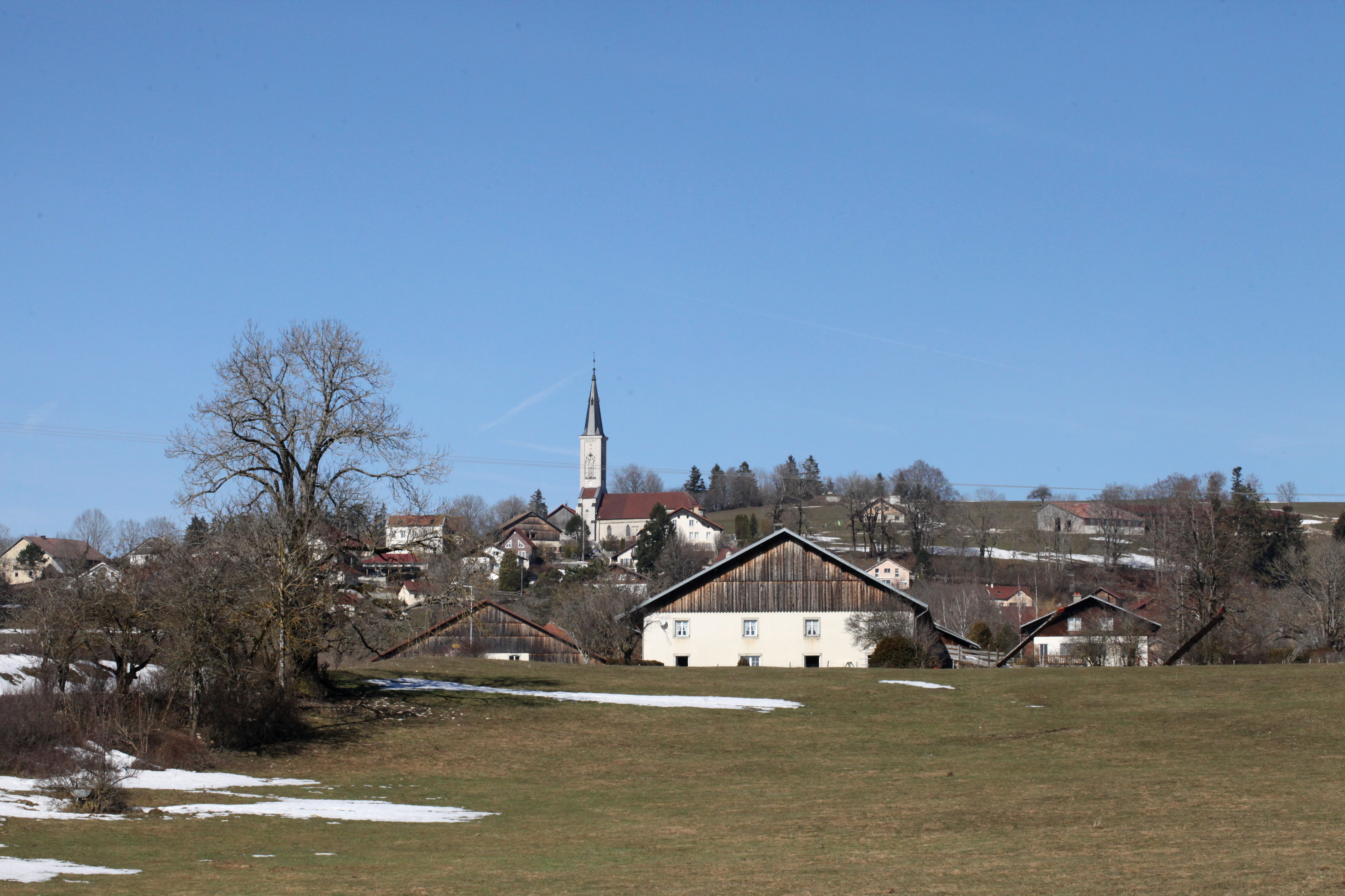 Vue de Bonnétage.